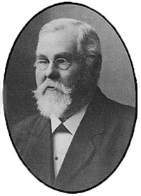 Alfred Smedberg (1850-1925)